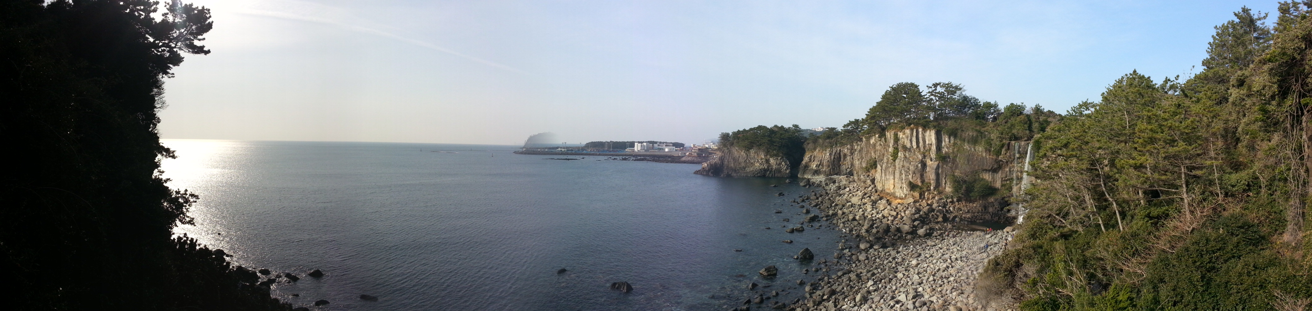 정방폭포 (3)